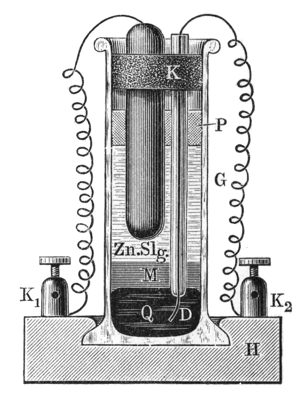 Galvanisches Element von Latimer Clark (Holzstich)